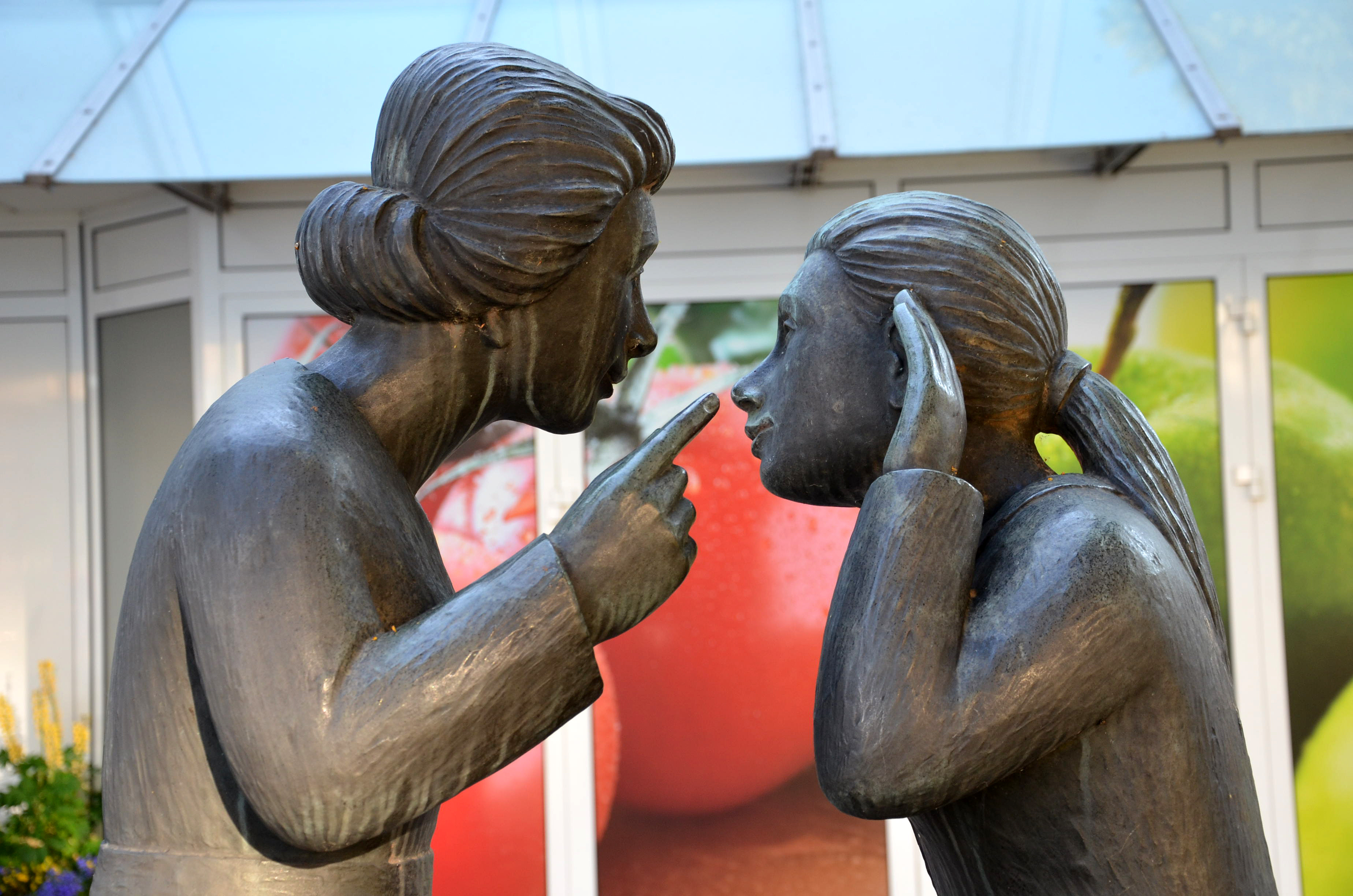 „Ich darfs ja nicht weitererzählen, aber psst, hätten Sie gedacht ...?“, Detail vom KLÖNSCHNACK des Bildhauers Fidele Bentele 1984 gestiftet vom Bürgerverein Kirchrode e.V., dem Ehepaar Wilhelm und Sophie Lück sowie 25 Bürgern und aufgestellt am Bogen der Tiergartenstraße Ecke Großer Hillen ...